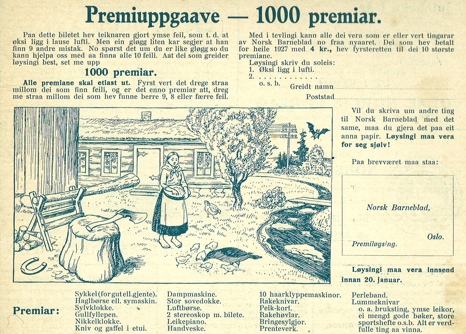 Annonse frå joletre 1921